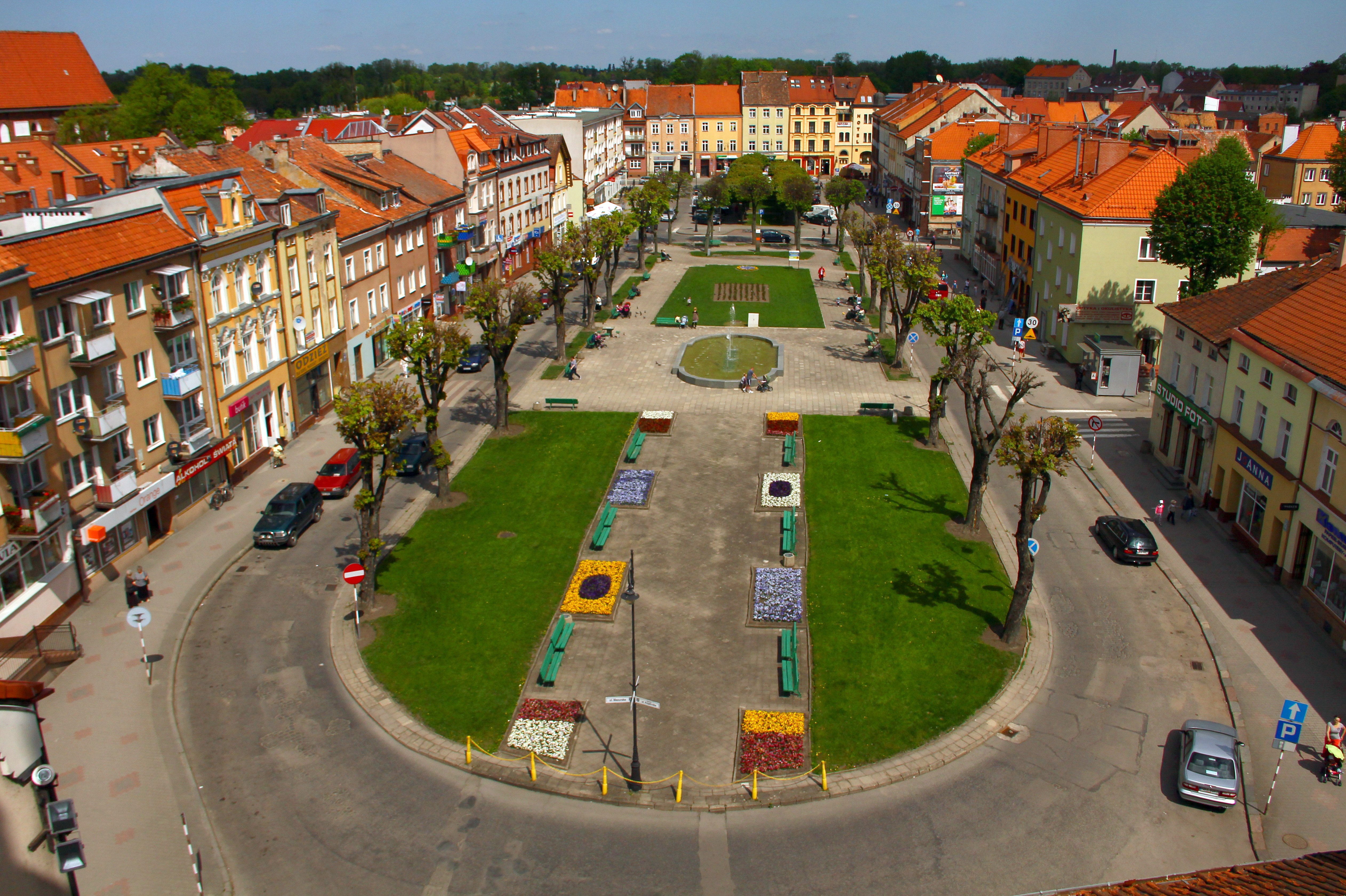 Bartoszyce. Plac Konstytucji 3 Maja (Rynek) widziany z Bramy Lidzbarskiej.